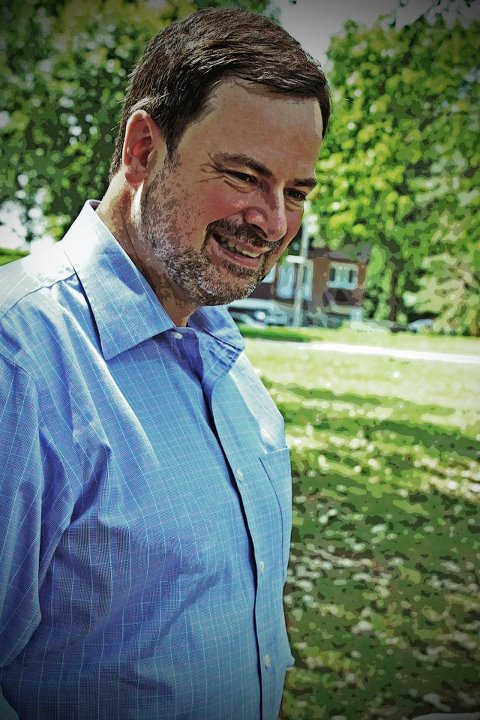 Photographie de l'homme politique Alain Paquet